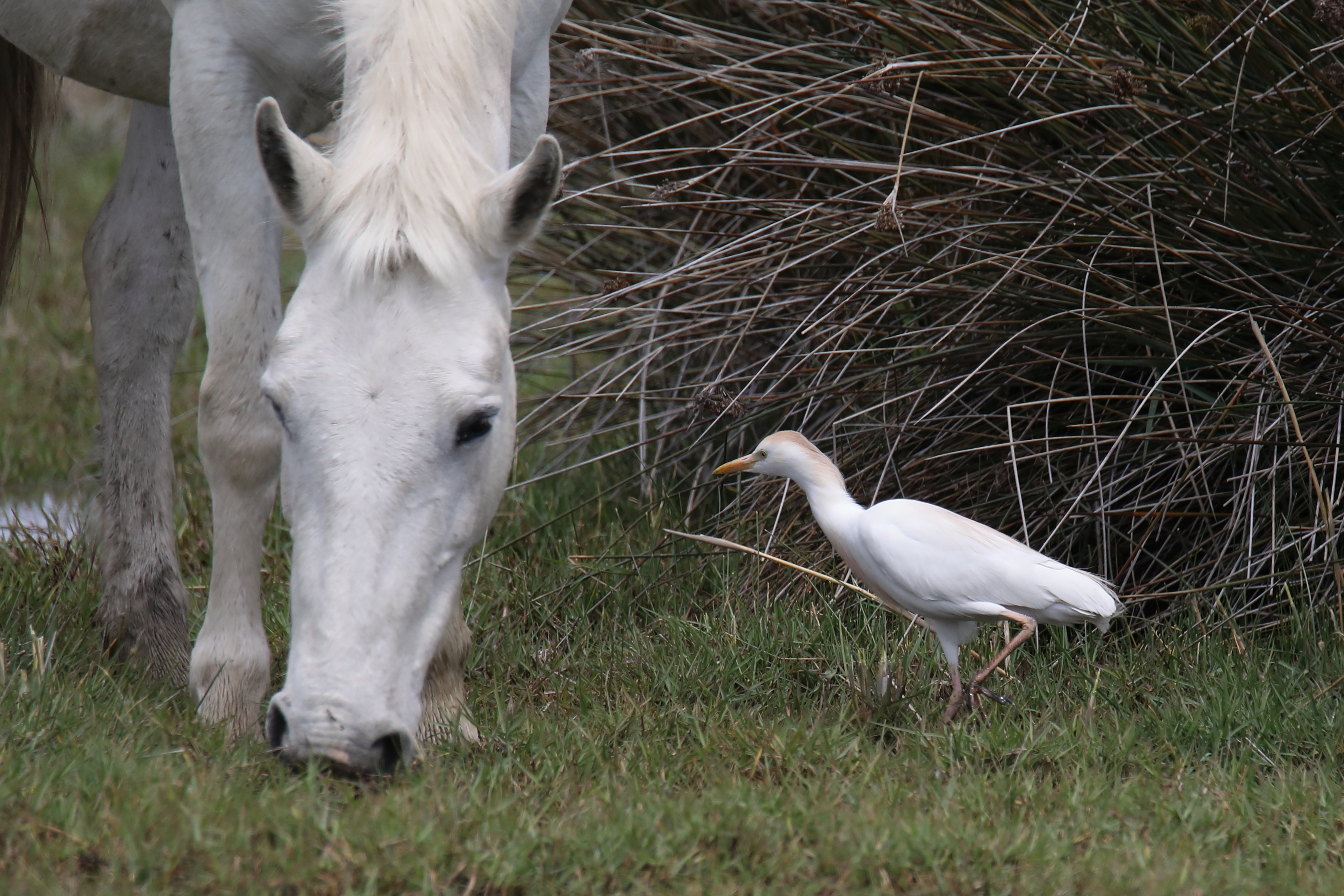 20170424 074 Camargue Koereiger